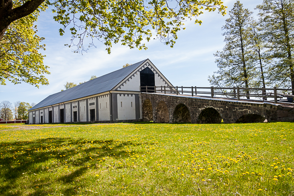 Kolhus nära lilldammen i Gimo, Östhammars kommun.